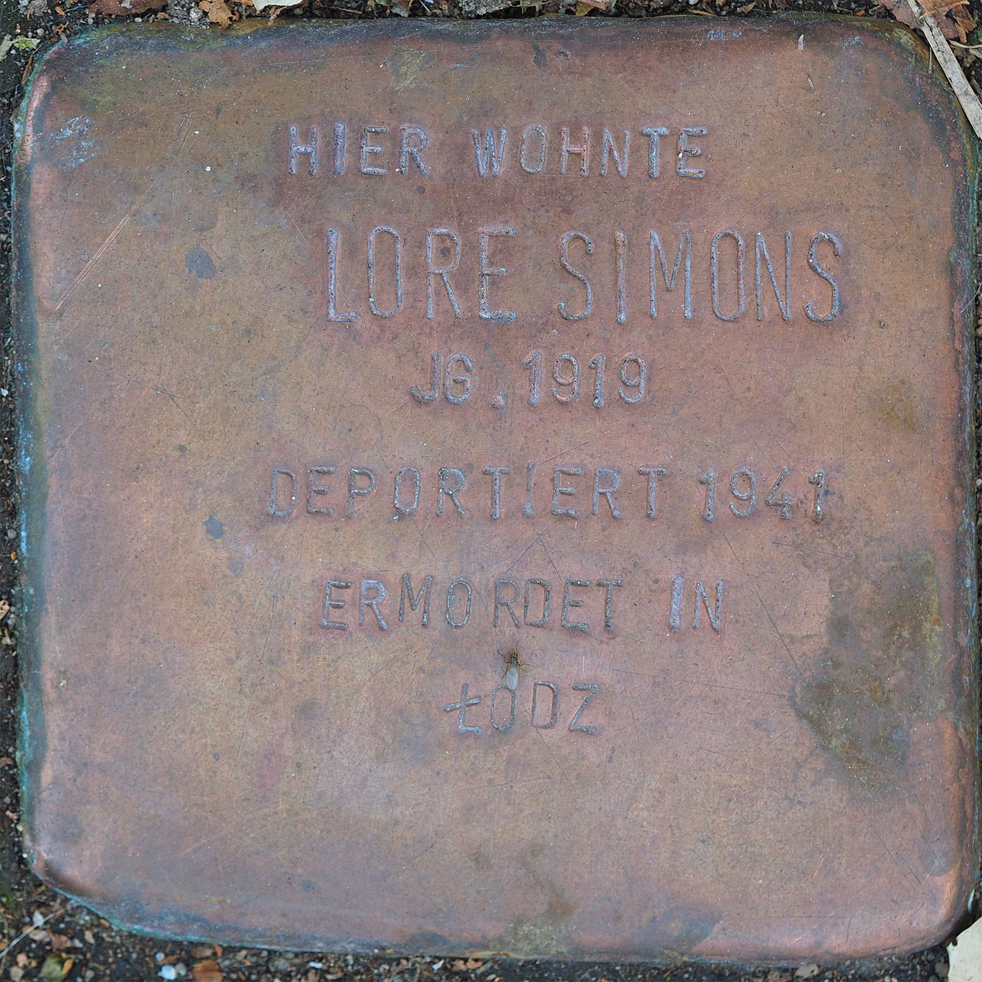 Stolperstein VIE: Simons, Lore